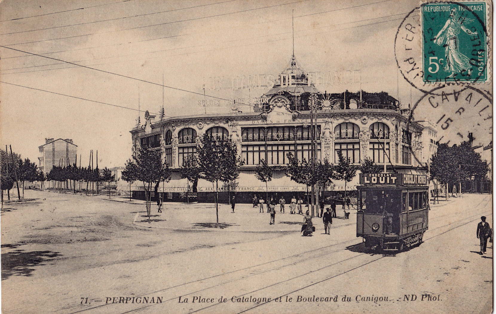 Carte postale ancienne éditée par ND, n°71 :PERPIGNAN - La Place de Catalogne et le boulevard du Canigou